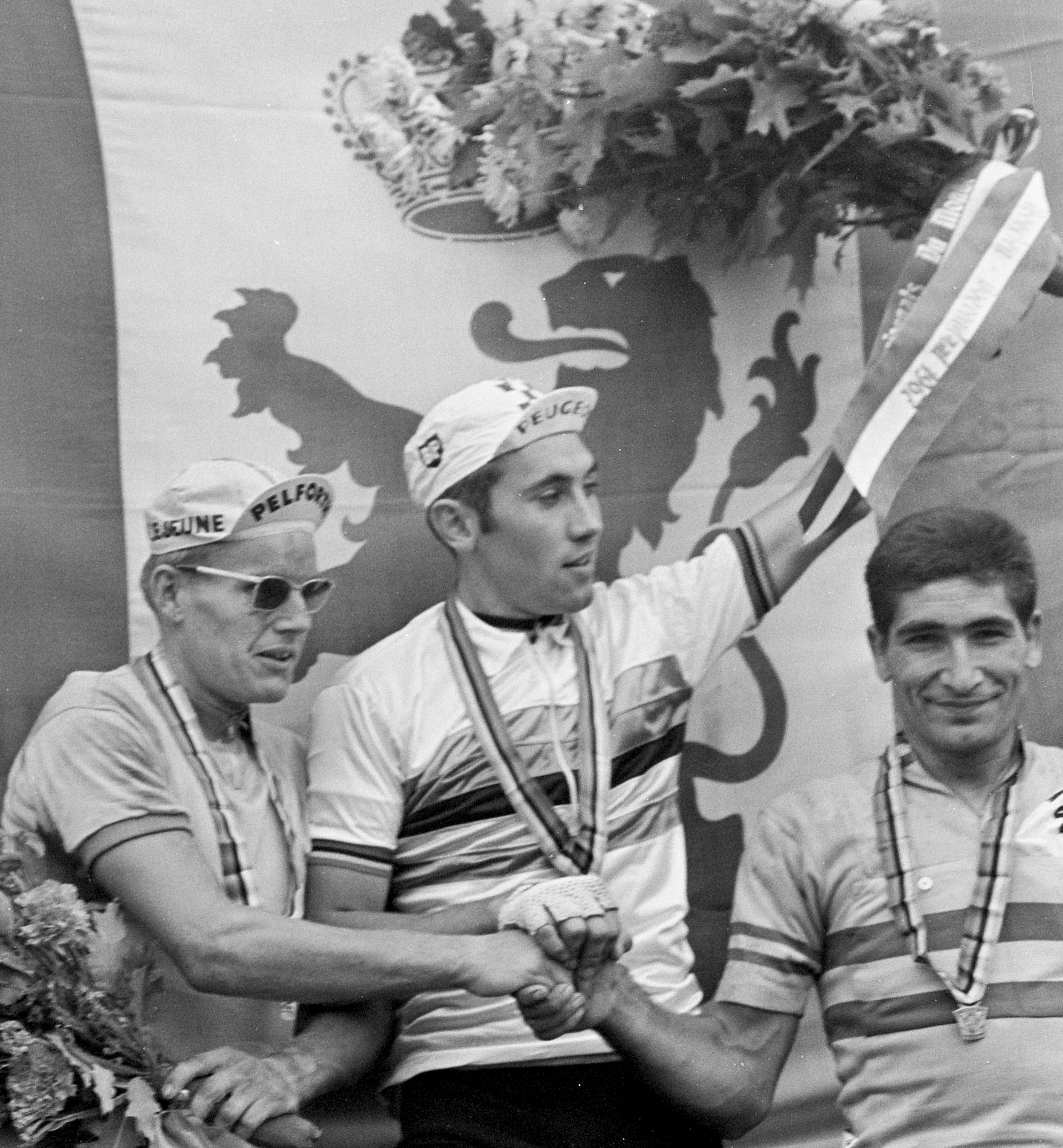 WK Wielrennen te Heerlen finish profs. Nummers 1.2.3 op podium